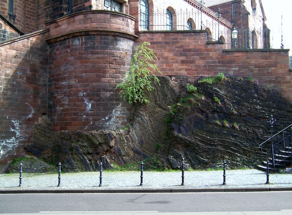 Condroz-Formation (Oberdevon) am Fuß von St. Adalbert (Aachen)